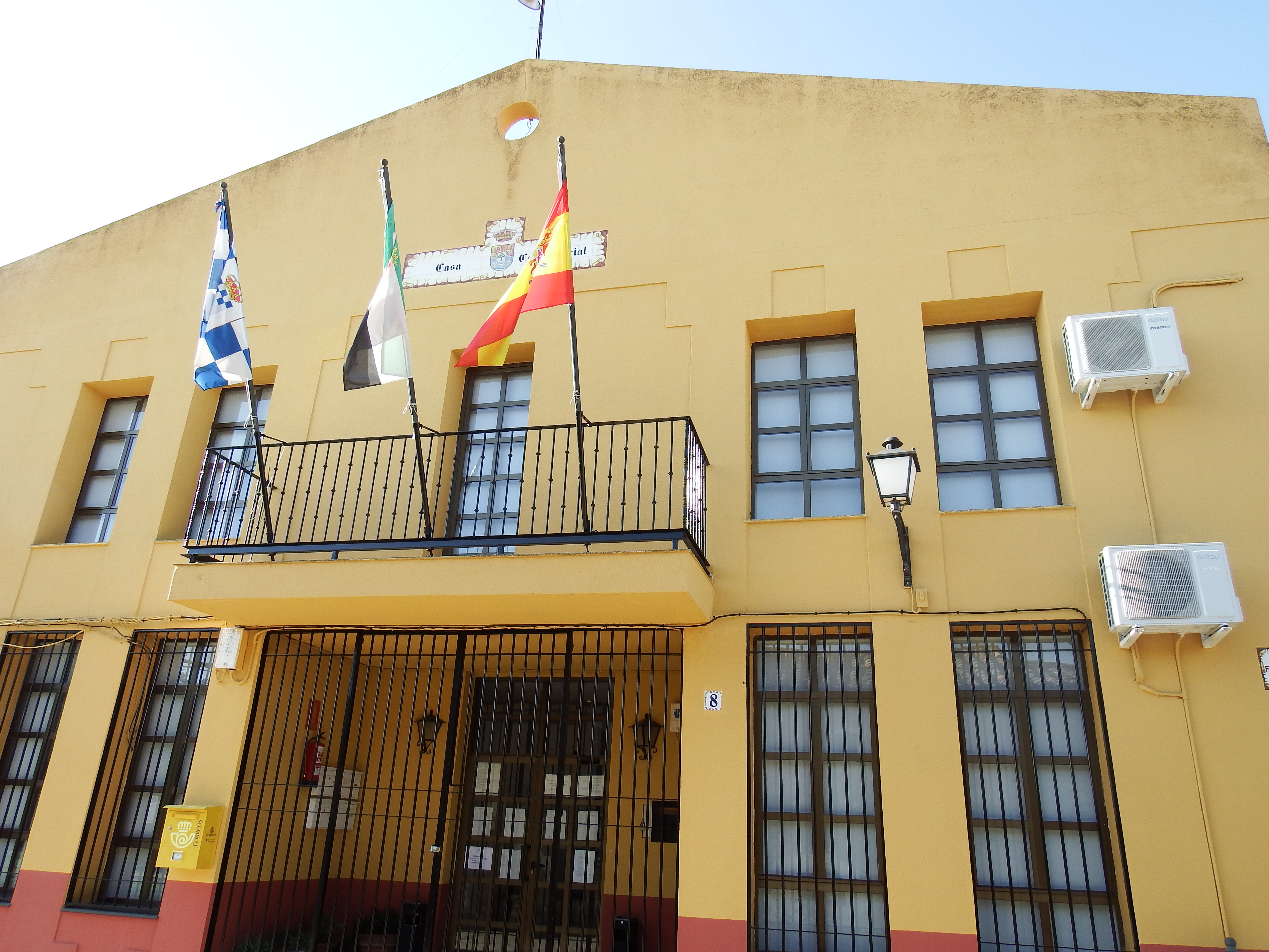 Valdehúncar